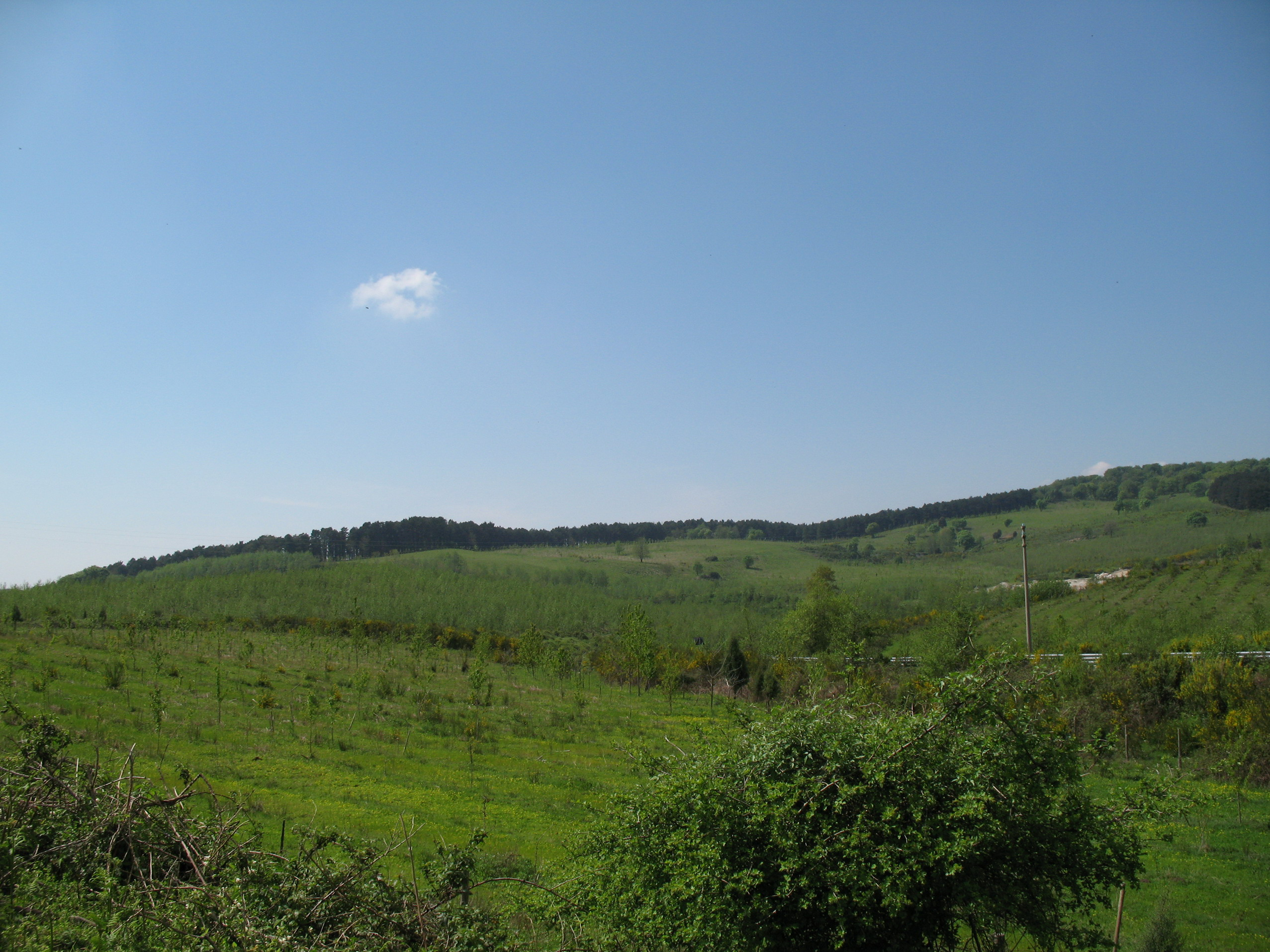 Paesaggio al passo della Limina in provincia di Reggio Calabria